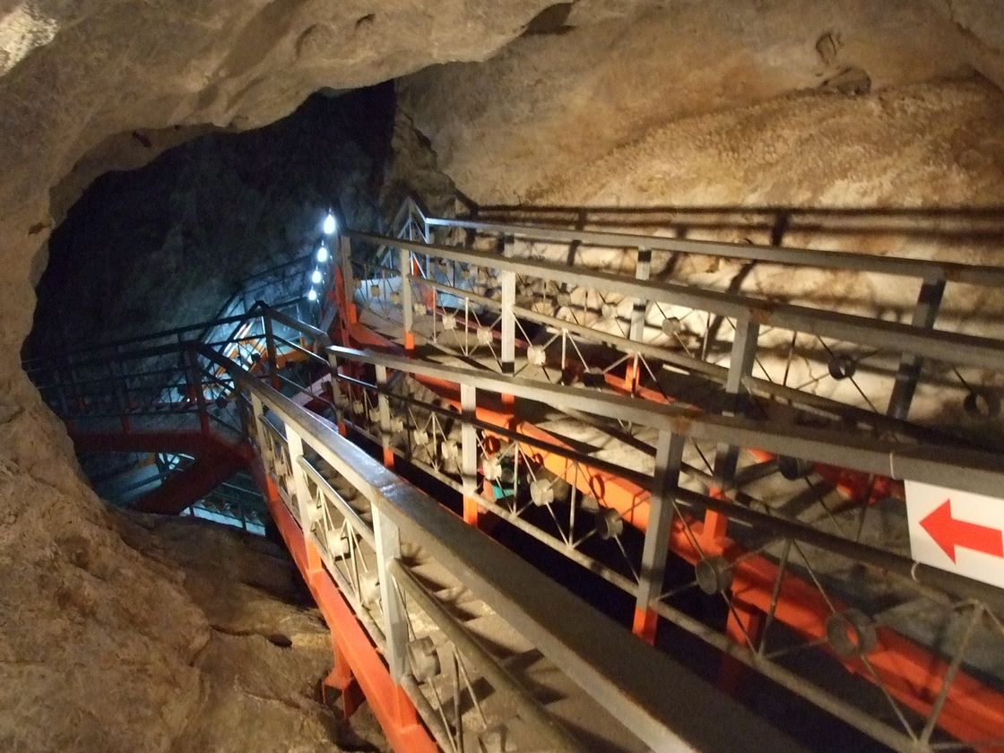 Kyusendo 球泉洞